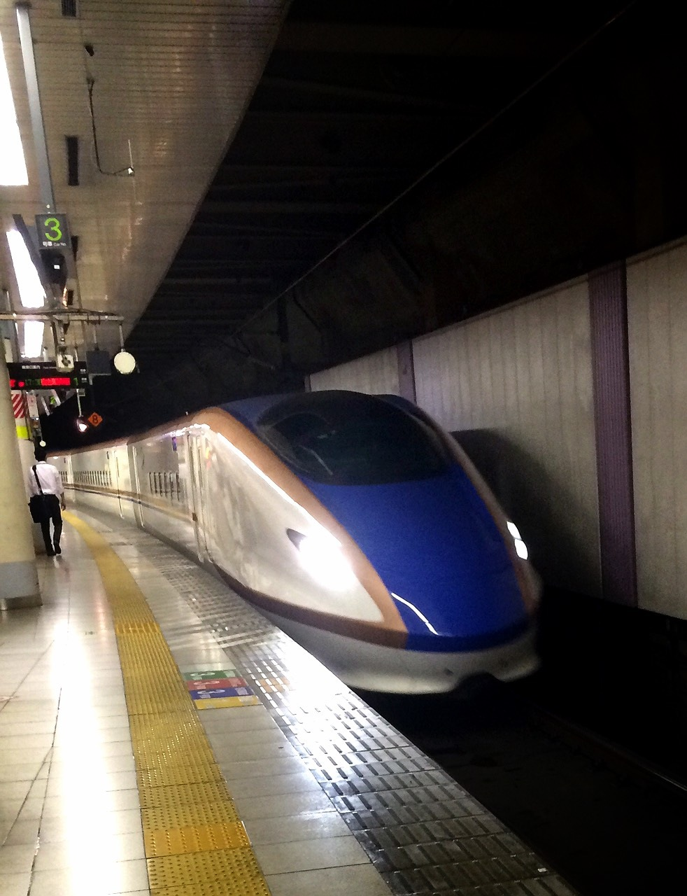 かがやき (新幹線) Kagayaki (Shinkansen bullet train)